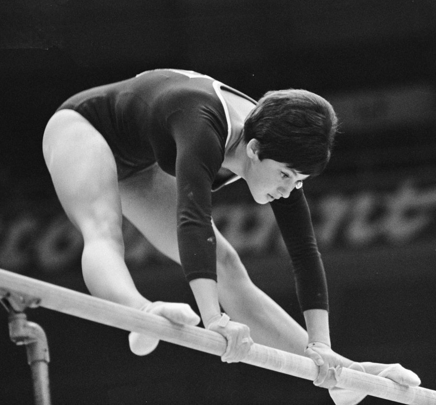 Wereldkampioenschappen turnen 1966 in Dortmund. Jindra Kostalava